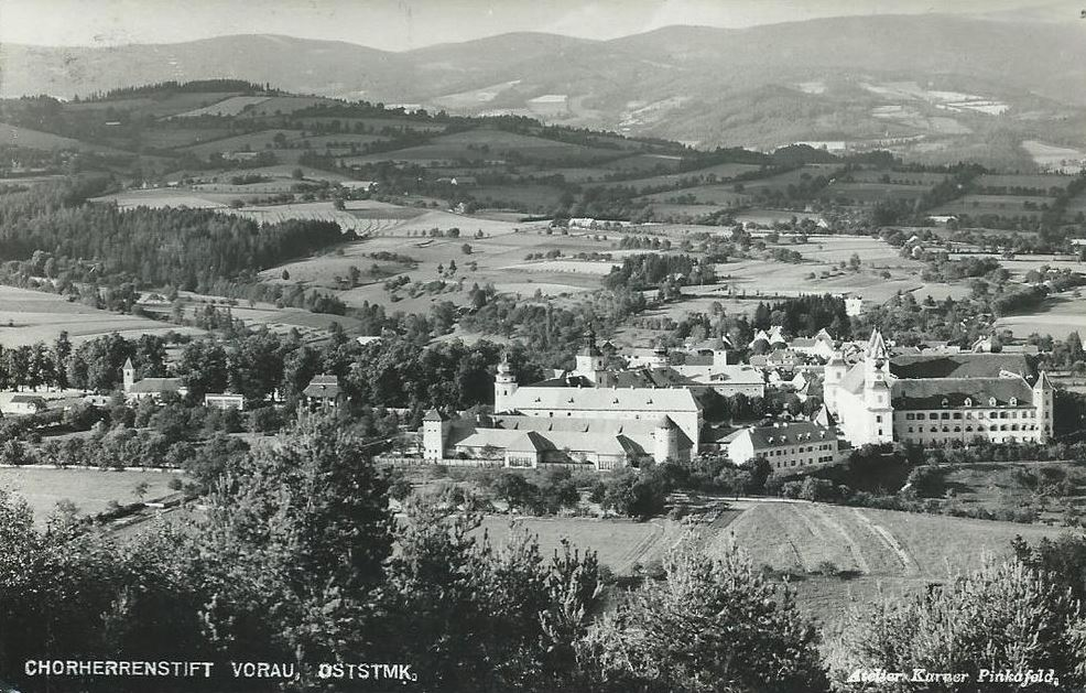 Stift Vorau in den 1940er-Jahren